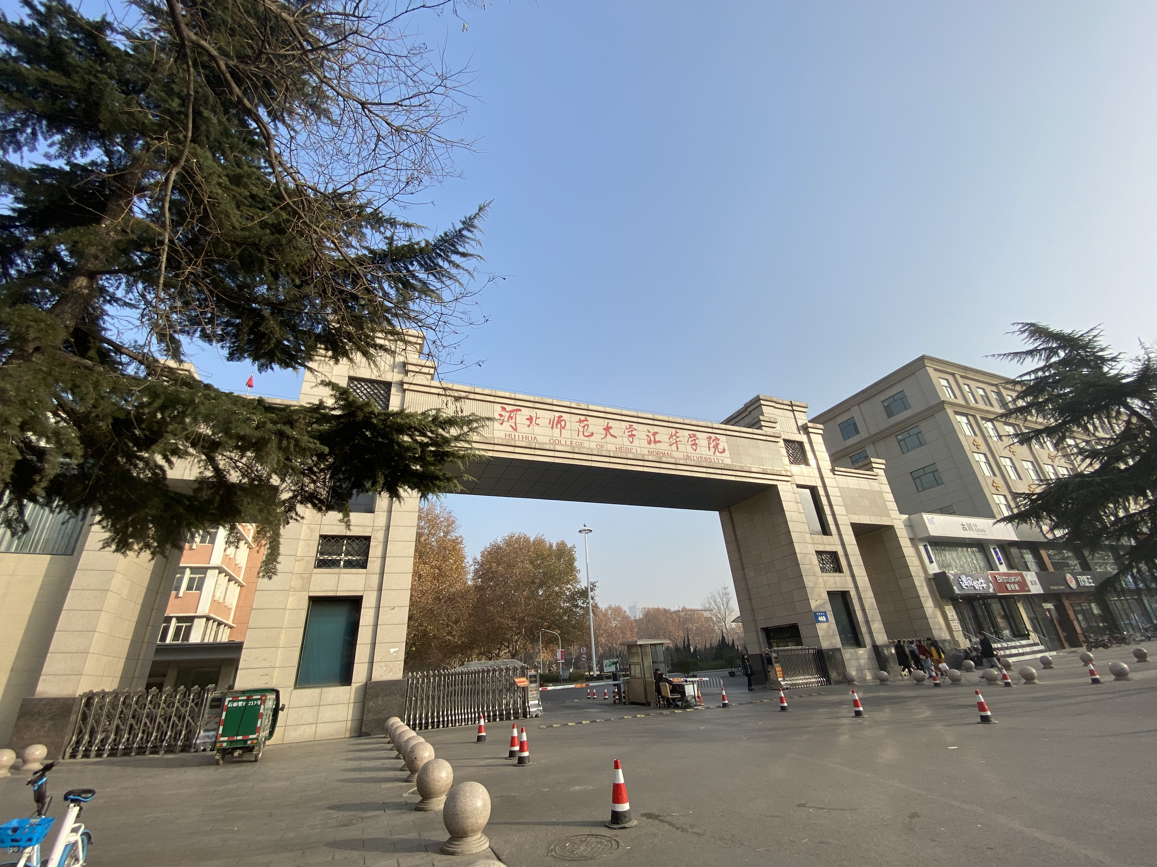 河北师范大学汇华学院，石家庄